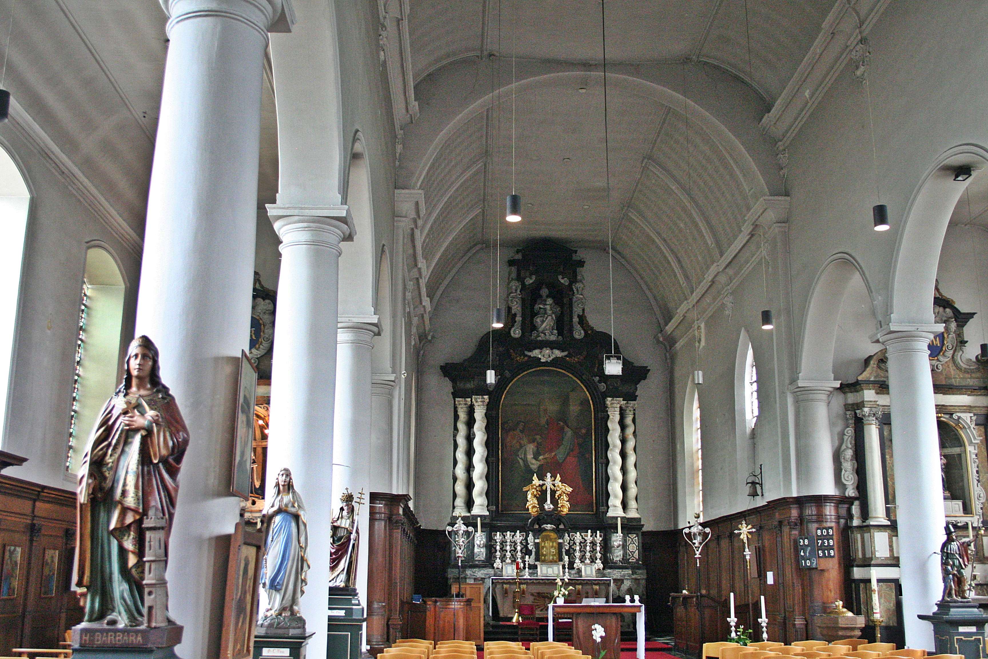 Interieur met zicht op koor met hoofdaltaar (Sint-Pieterskerk Langdorp)